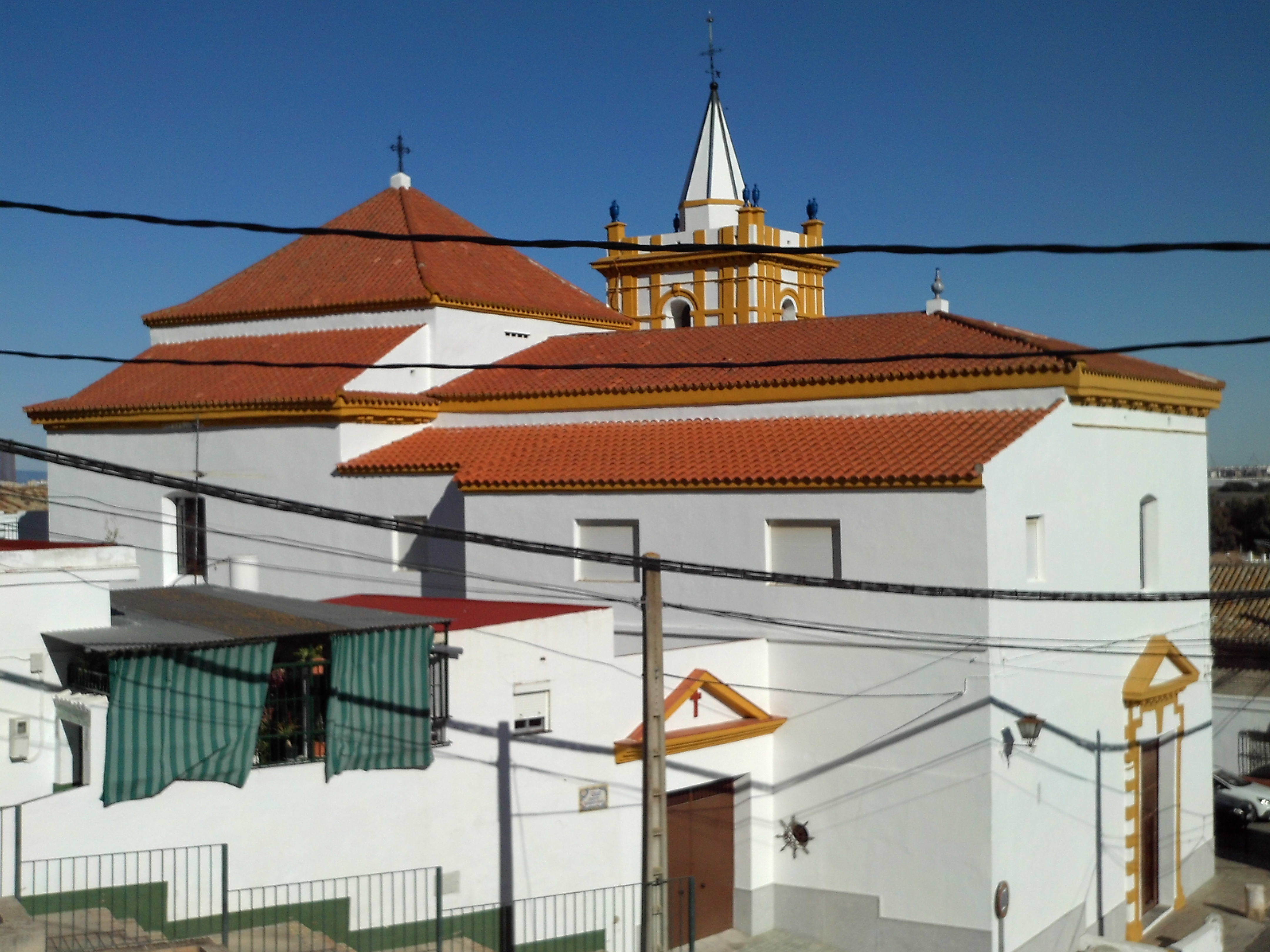 Iglesia de Santa María de Gracia. Gelves. Provincia de Sevilla, Andalucía, España.